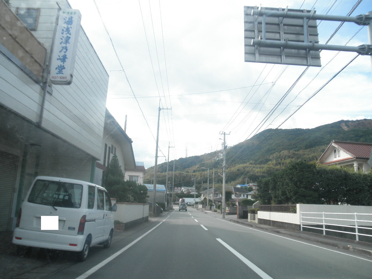 徳島県阿南市津乃峰町中分 徳島県道286号津乃峰筒崎線